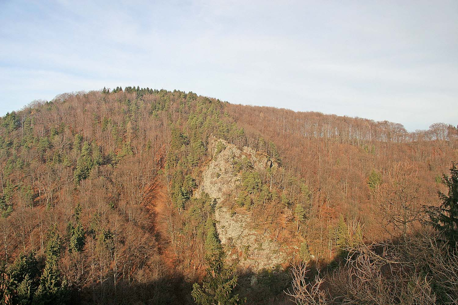 NPR Lichnice - Kaňkovy hory z vyhlídky Dívčí kámen autor:Zp